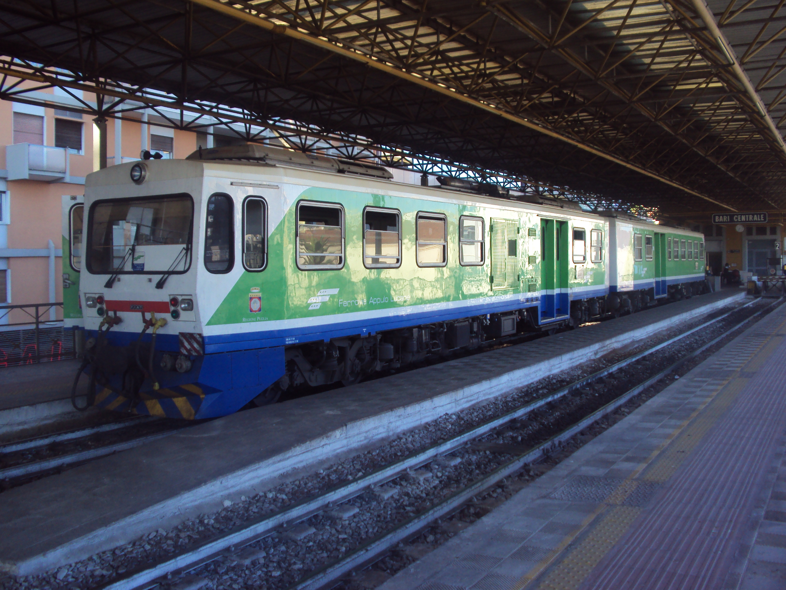 Automotrice binata M4.353 delle Ferrovie Appulo Lucane in sosta a Bari Centrale